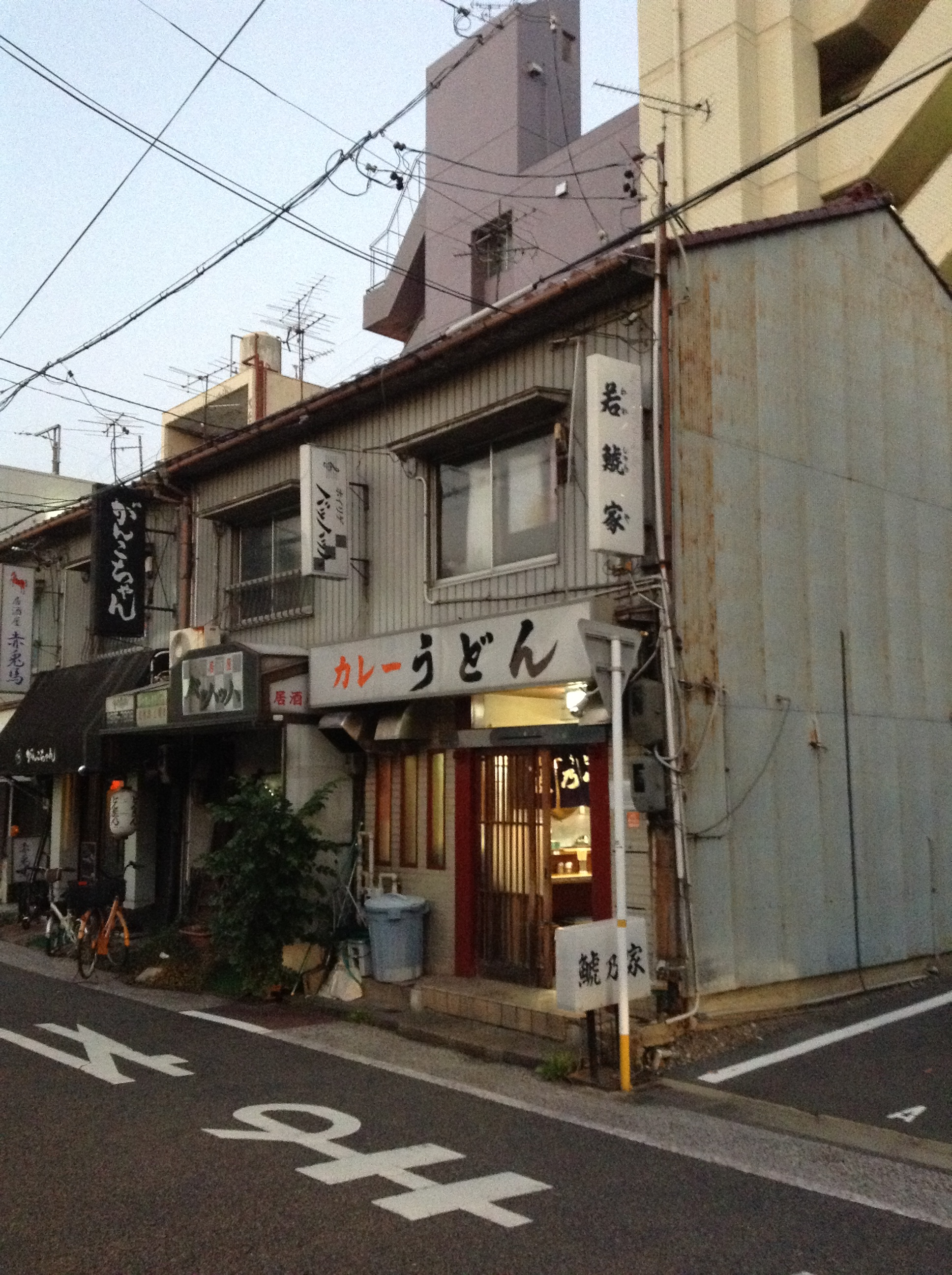 名古屋市北区田幡二丁目のカレーうどん屋「鯱乃家」を南西から写す